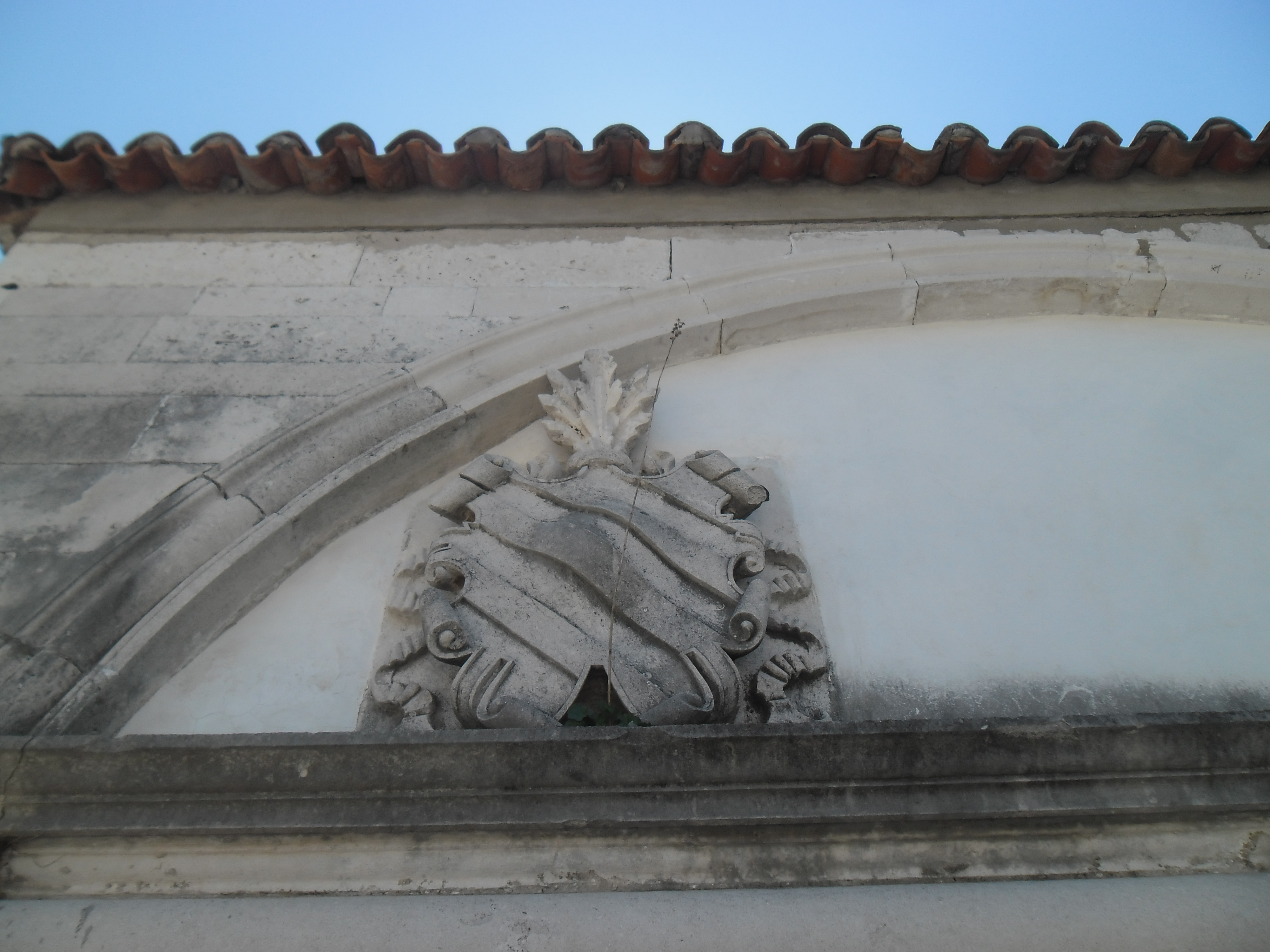 Komolac u Rijeci dubrovačkoj